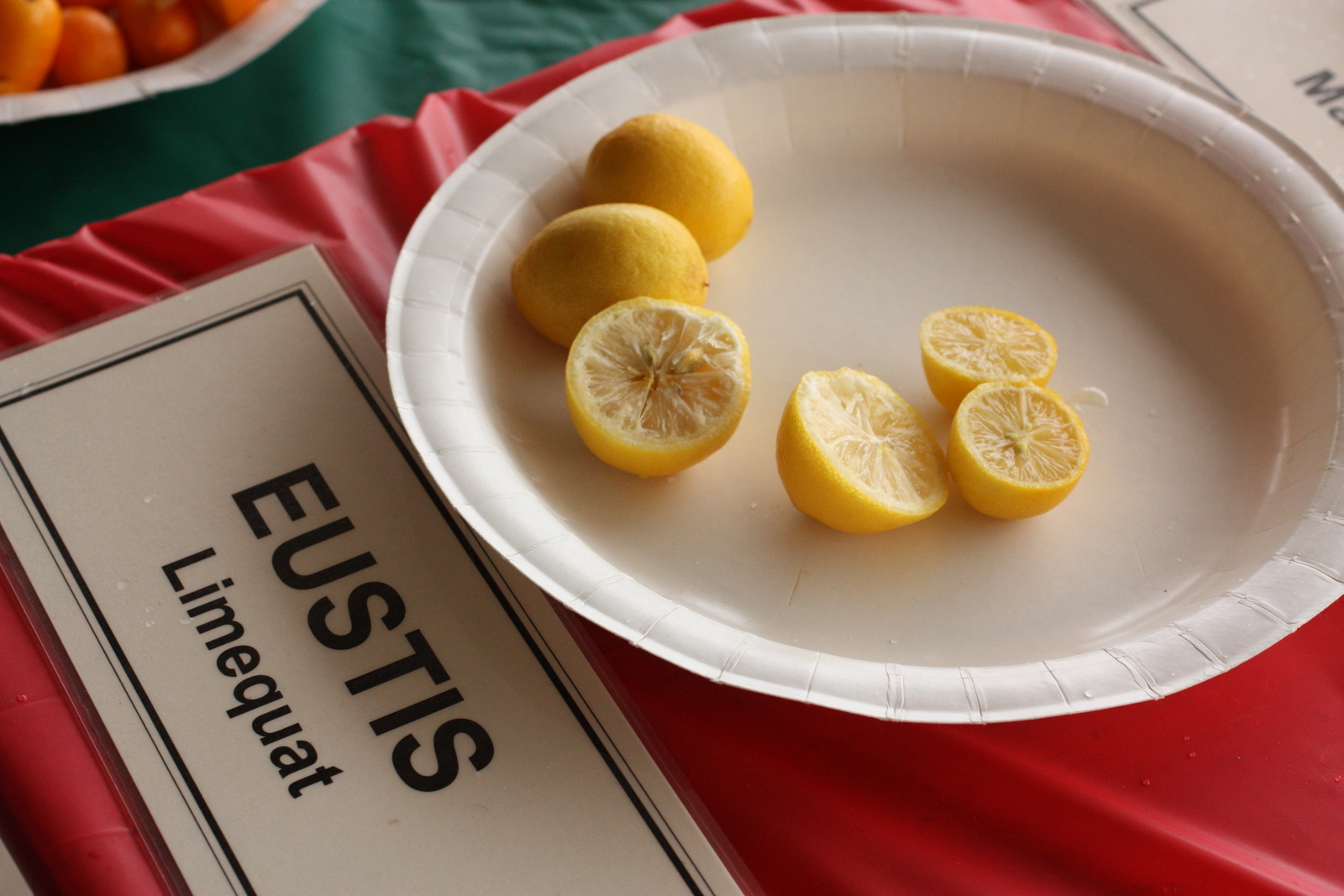 A limequat is a key lime + kumquat hybrid.